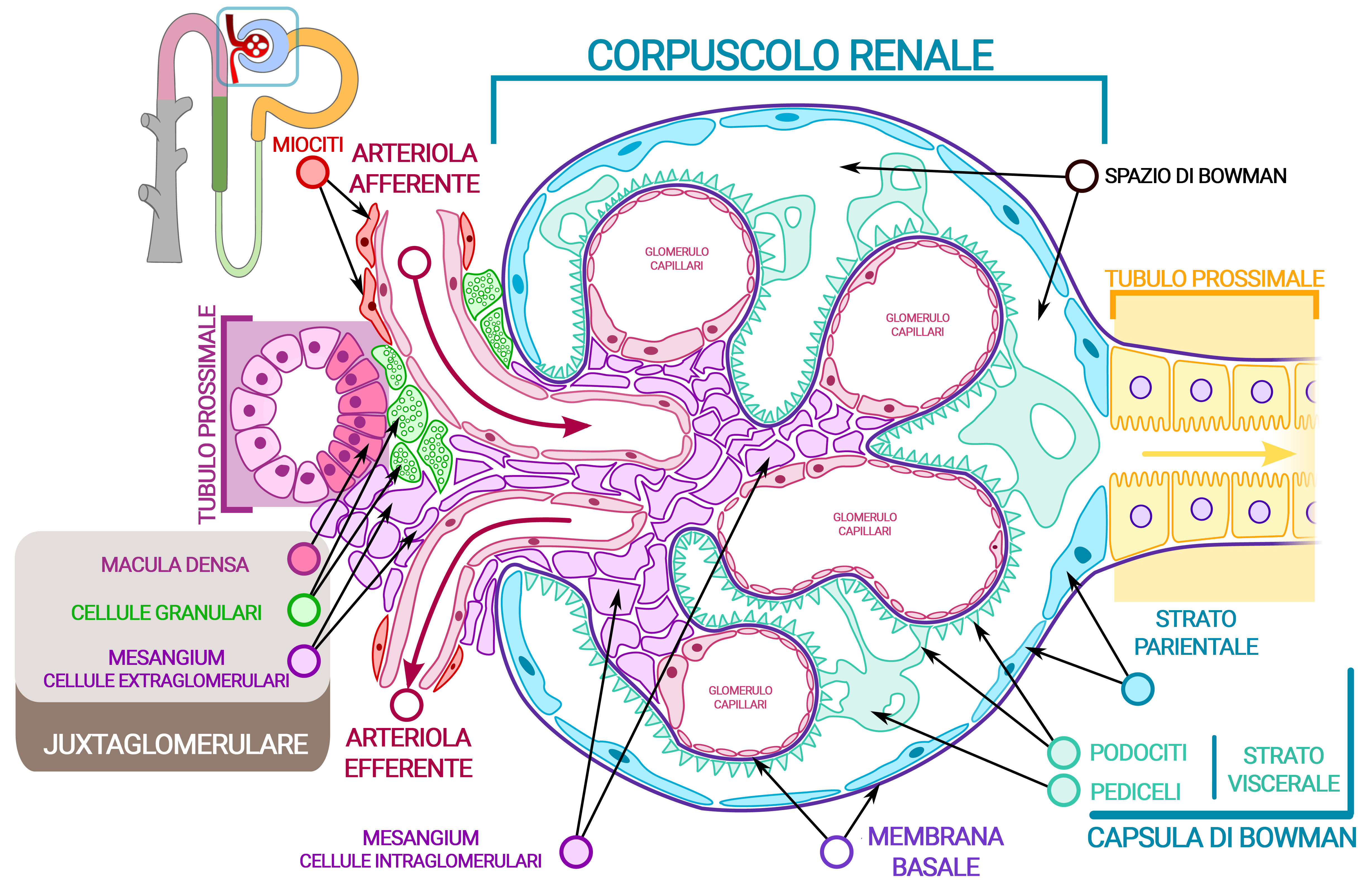 Modificato da RoyB97 in Italiano, M.Komorniczak è l'autore originale